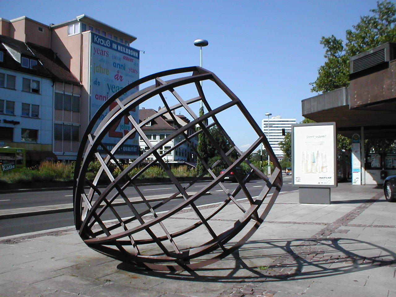 Kuppel-Mahnmal zur Erinnerung an die Heilbronner Synagoge, Allee Heilbronn